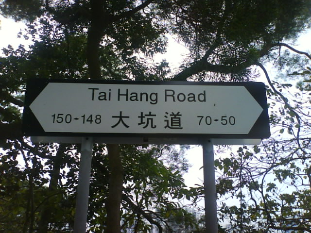 大坑道；來源 User:Iflwlou